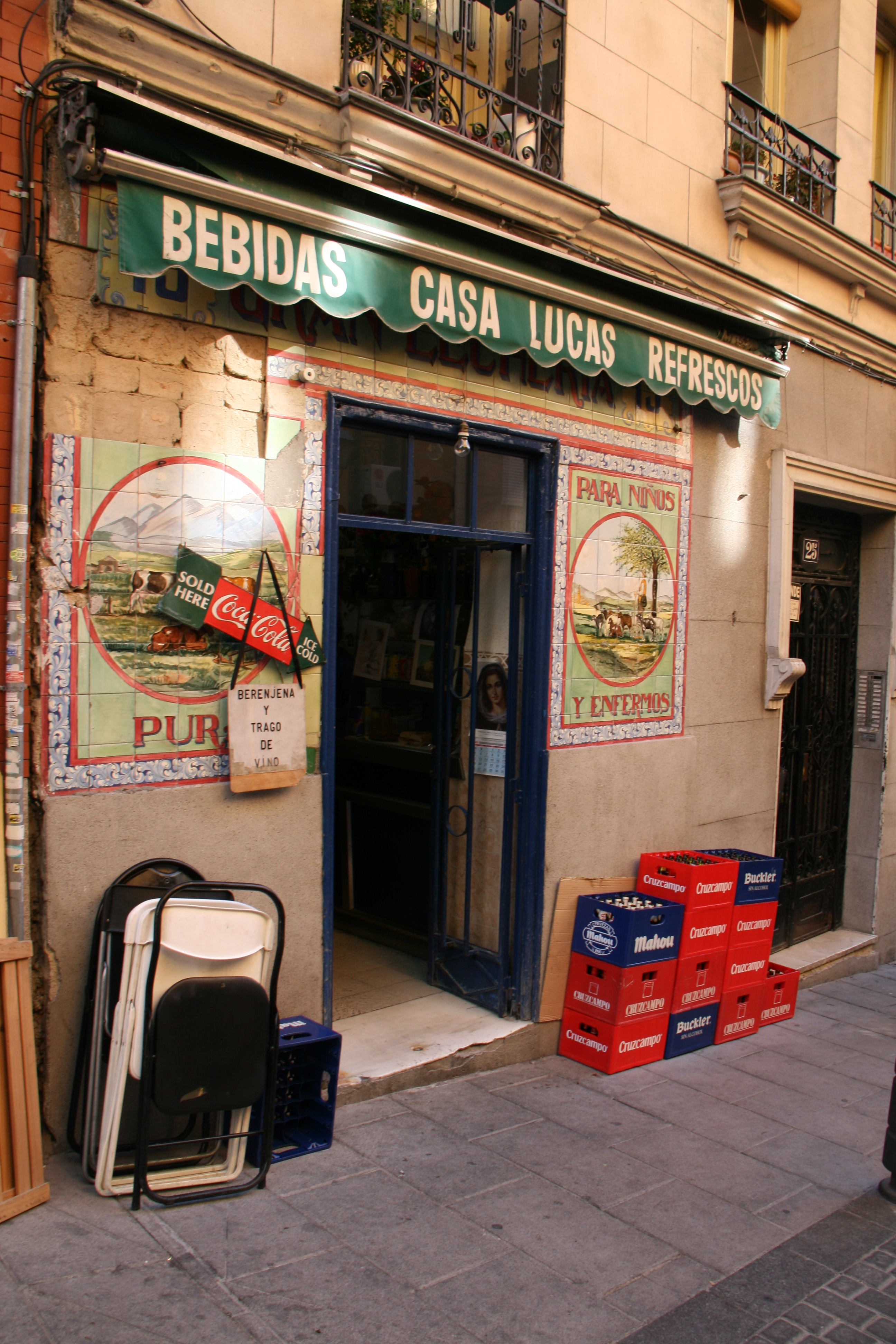 Bebidas casa lucas, Colombia, 9 (Madrid)